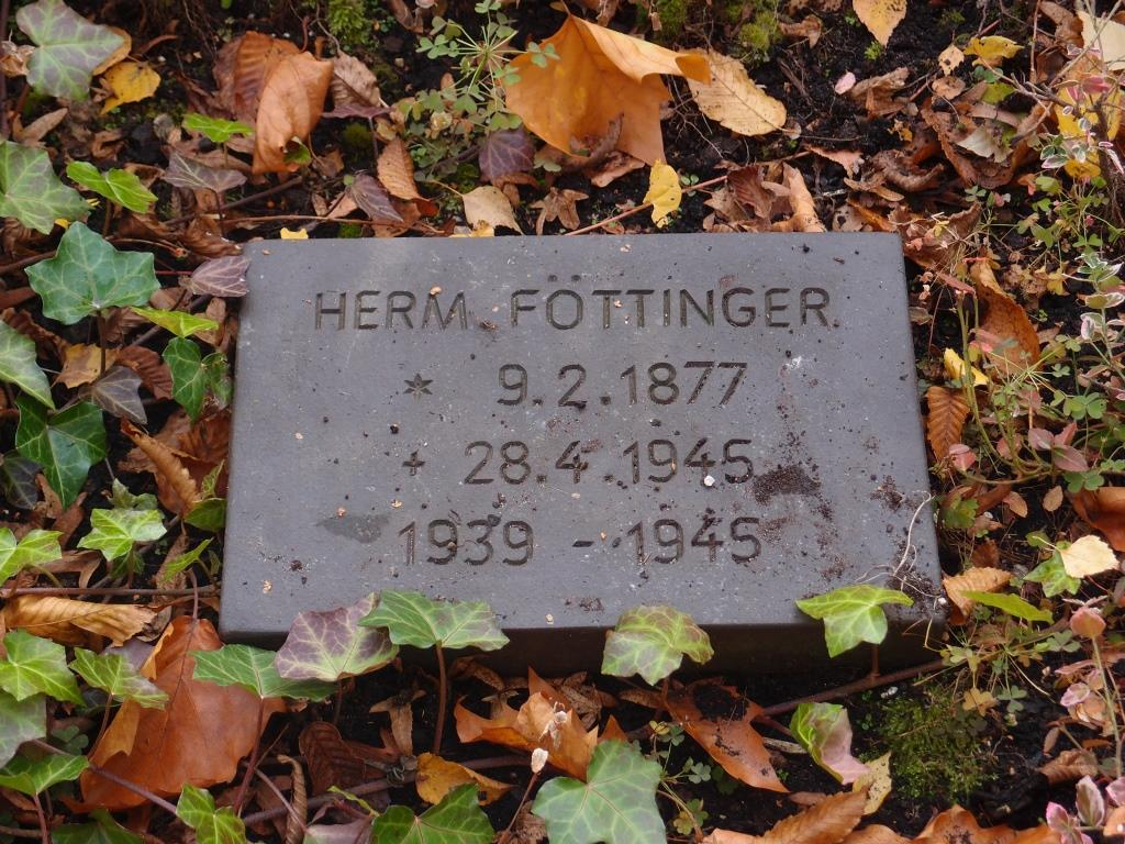 Grab des Elektroingenieurs Hermann Föttinger (1877-1945) auf dem Friedhof Wilmersdorf in Berlin.